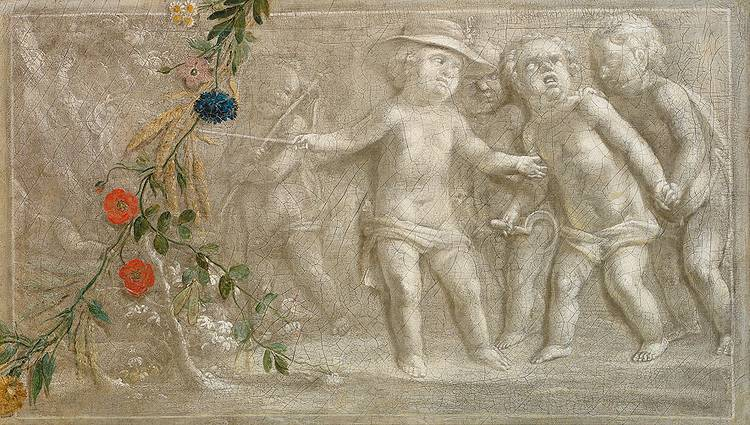 Putti als Allegorie des Sommers, Grisaille, Öl auf Leinwand, 57 x 97 cm